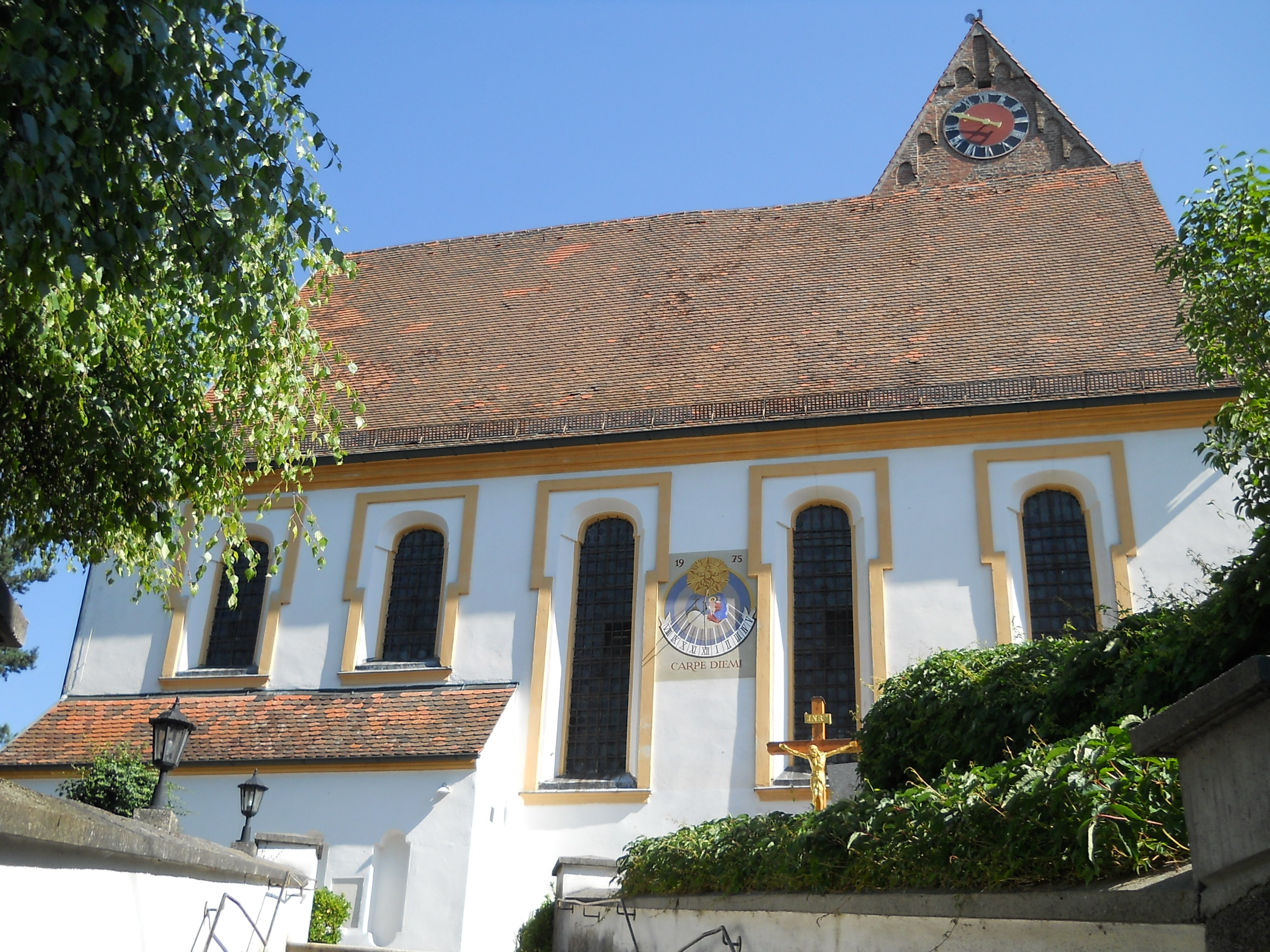 Gempfing (Ortsteil von Rain am Lech im Landkreis Donau-Ries), Kath. Pfarrkirche St. Vitus, Südfassade